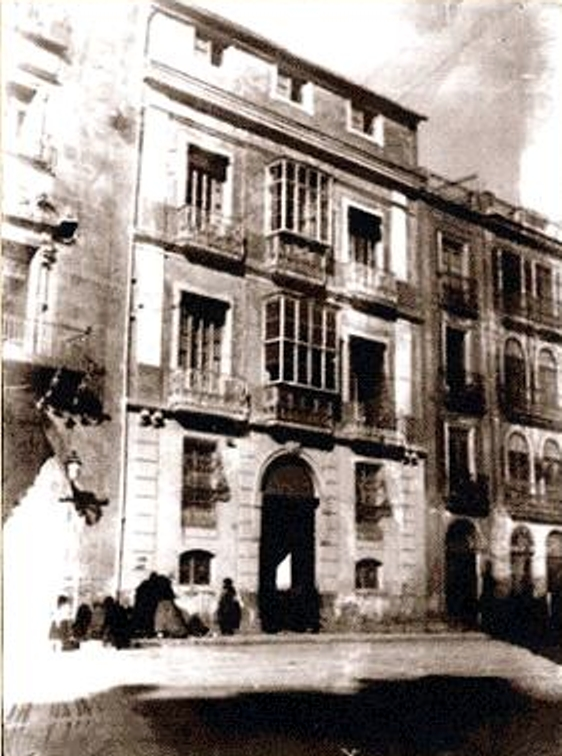 Fotografía de colección familiar, tomada en 1890.